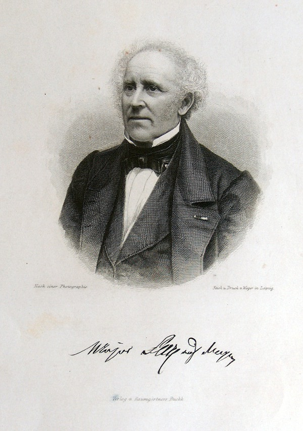 Friedrich Anton Serre (1823–1892) auf einem Stahlstich von August Weger (1823–1892).